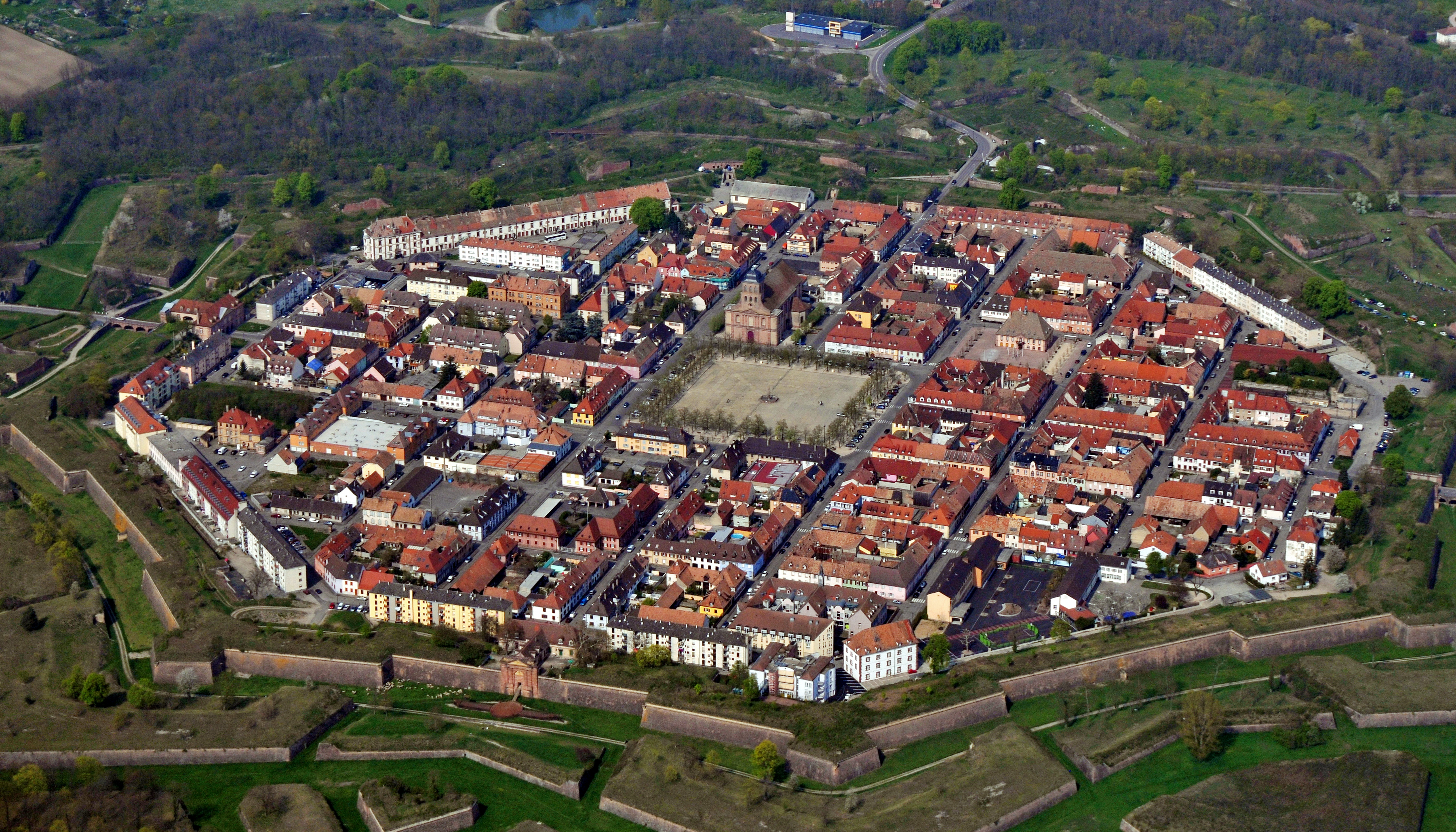 Remparts de Neuf-Brisach, Neuf-Brisach, Haut-Rhin, Alsace, France. .